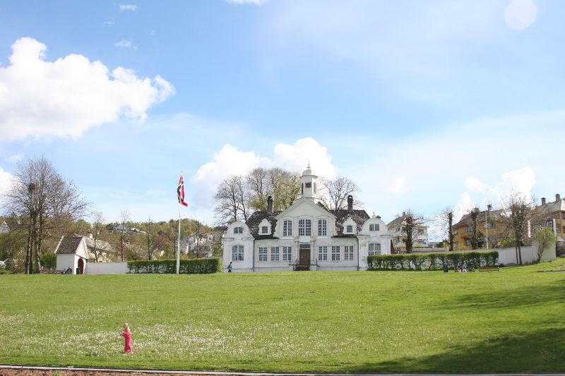 Damsgård hovedgård, Bergen, Norway.